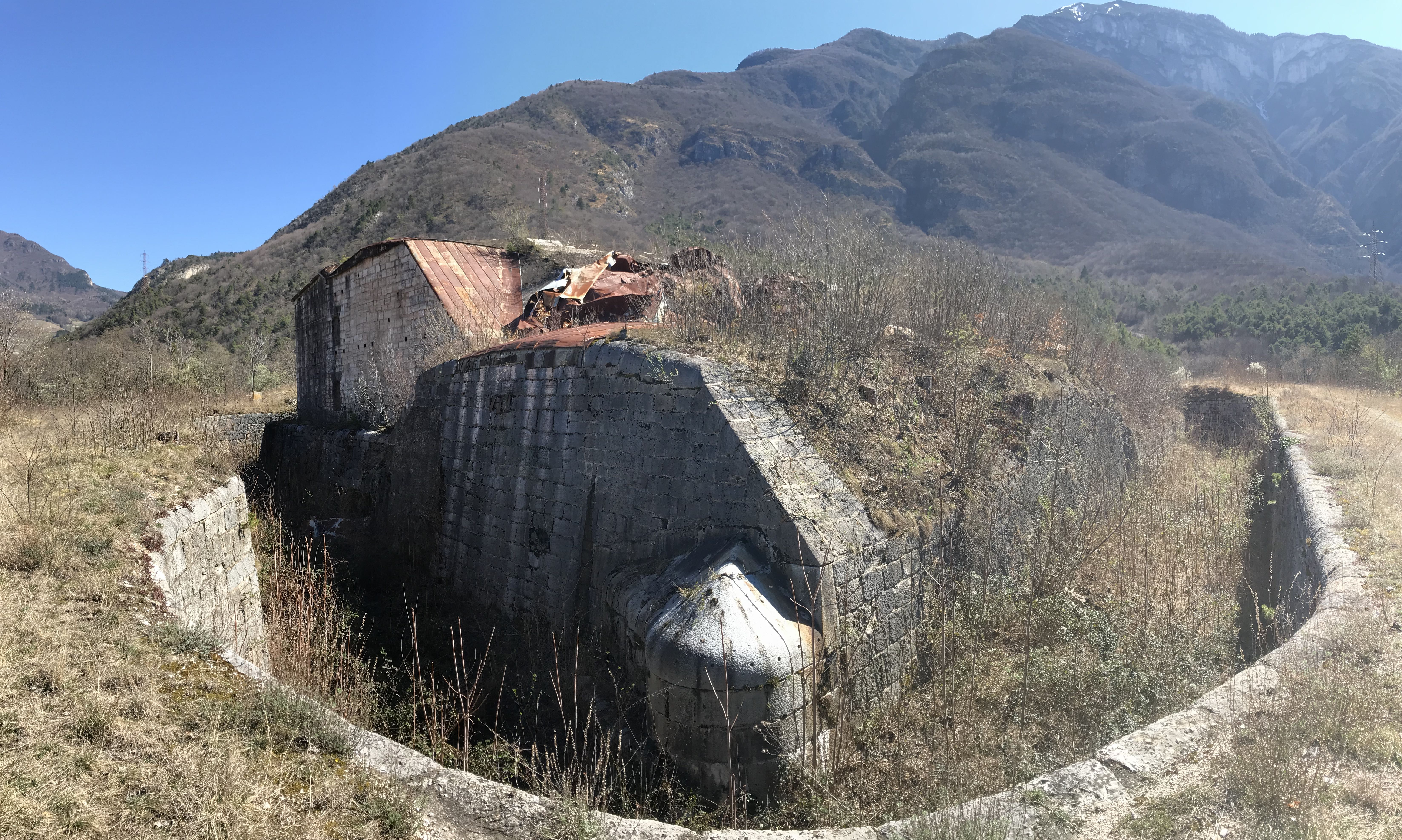 Veduta del Forte Mattarello